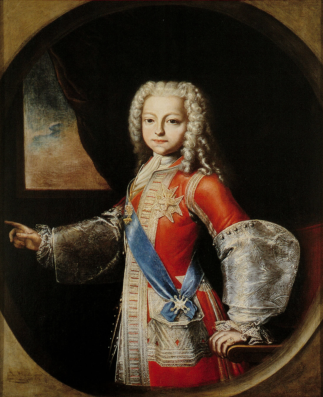 Retrato infantil del infante de España Felipe de Borbón (1720-1765), futuro duque de Parma e hijo del rey Felipe V de España.